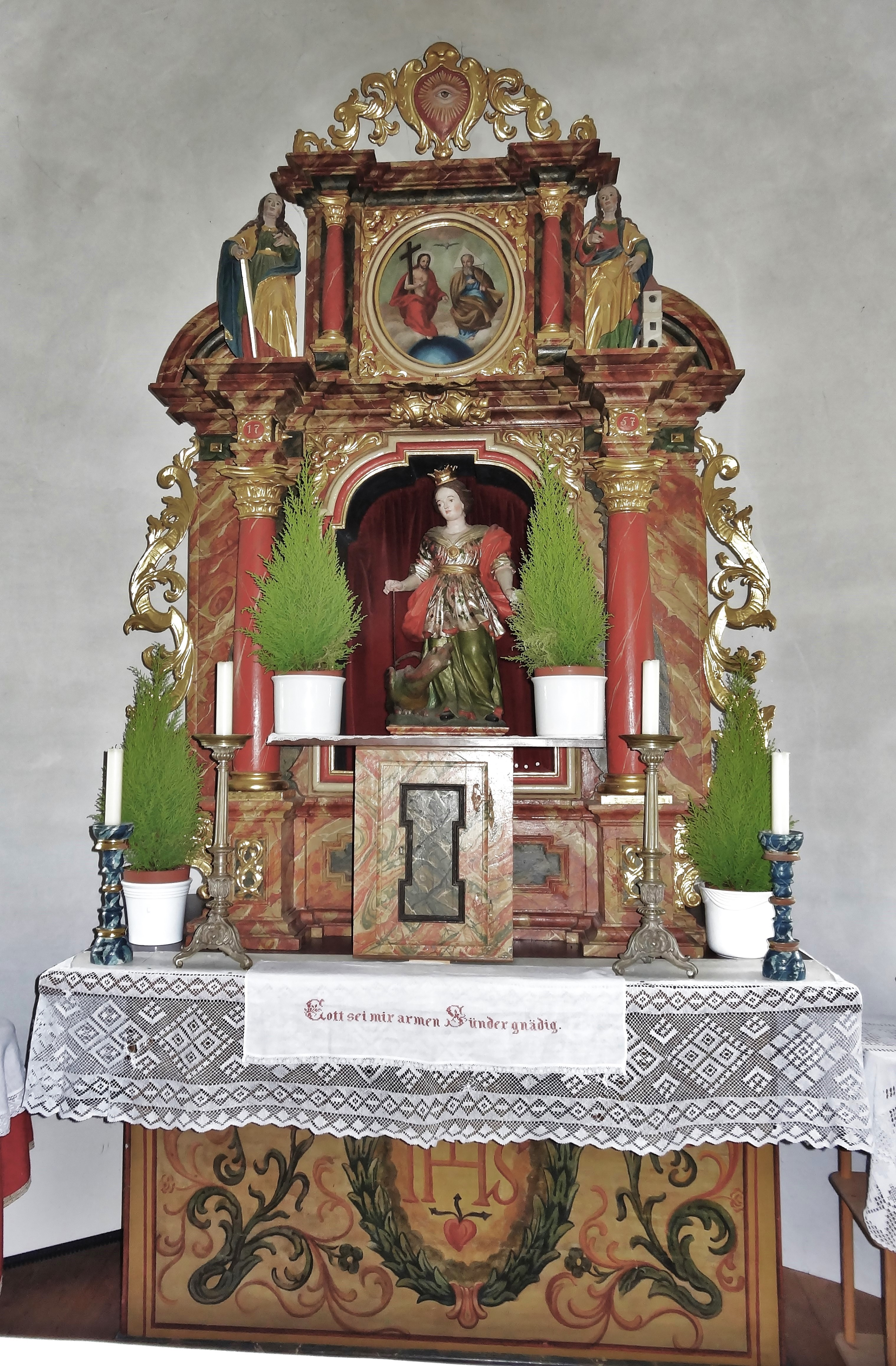 Kath. Filialkirche St. Margarethen (Tiffen), der Altar